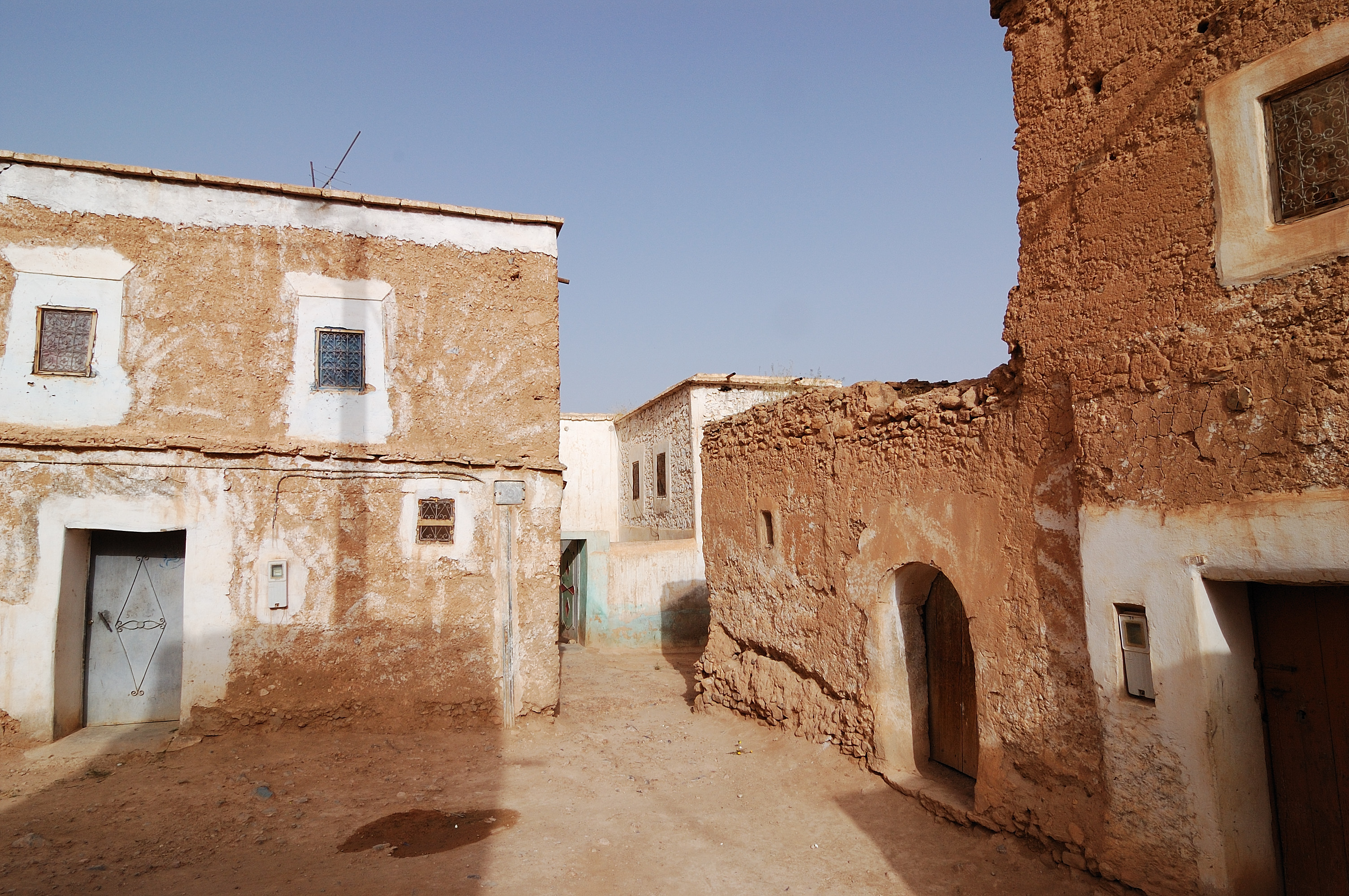 Taliouine, Morocco [2009]